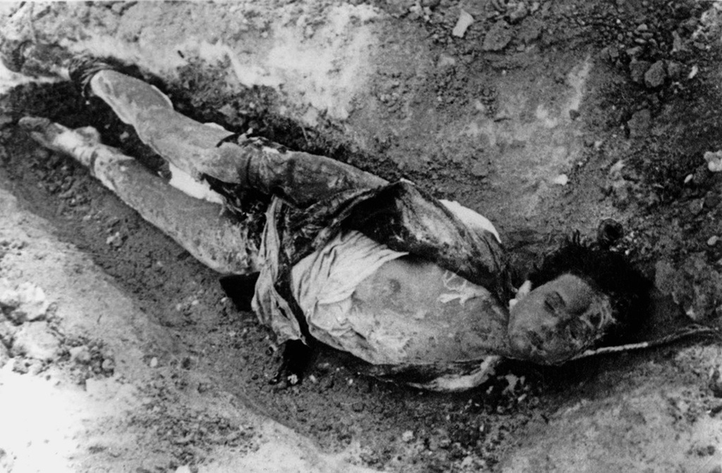 Фото казнённой Зои Космодемьянской